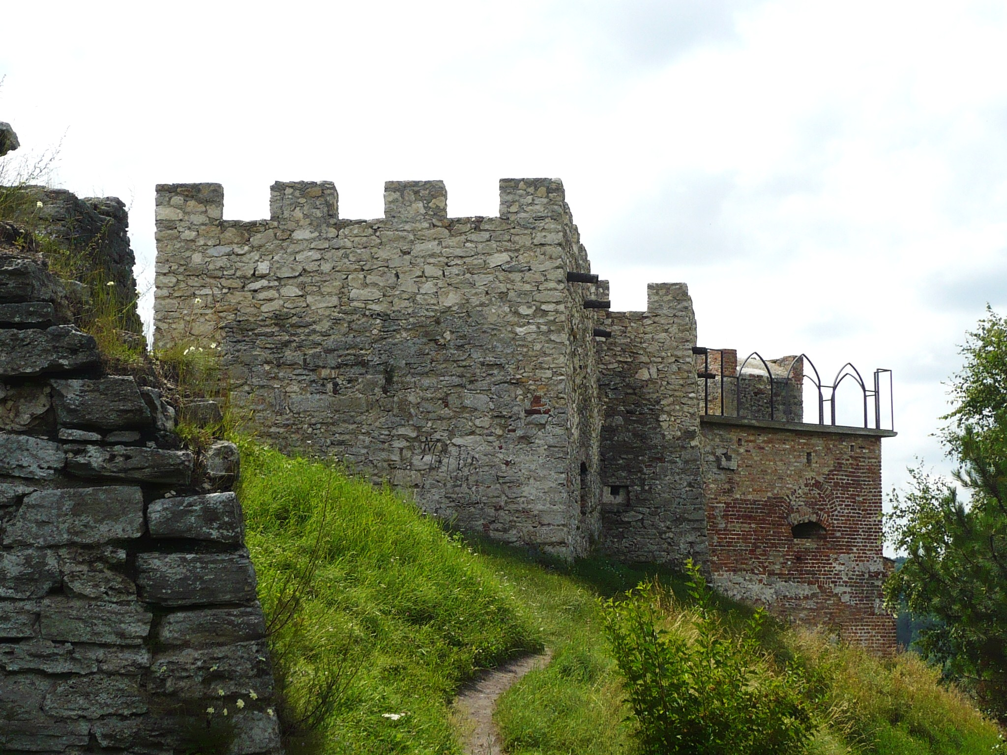 Zamek w Krzemieńcu